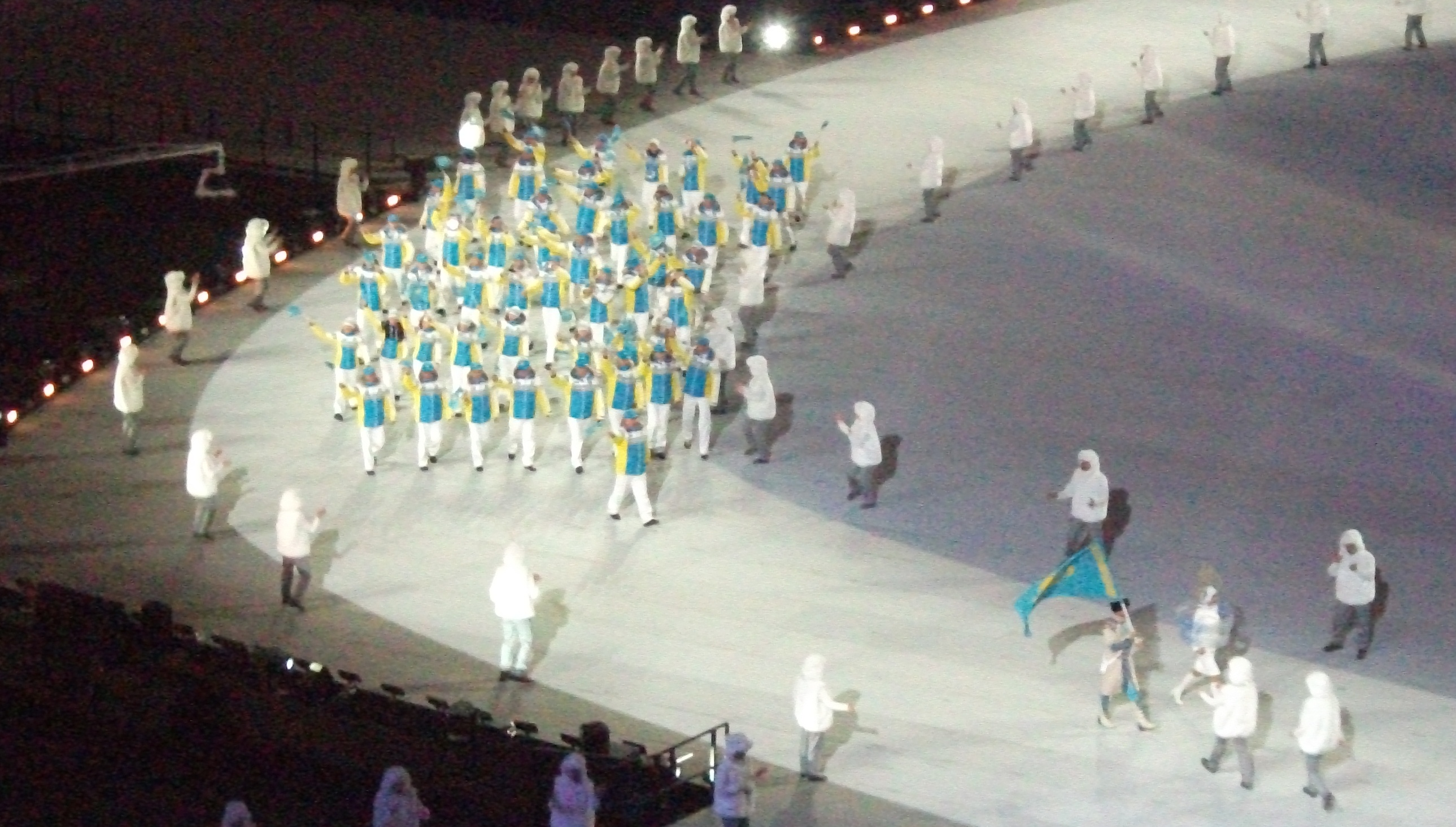 Сборная Казахстана на церемонии открытия Олимпийских игр в Сочи